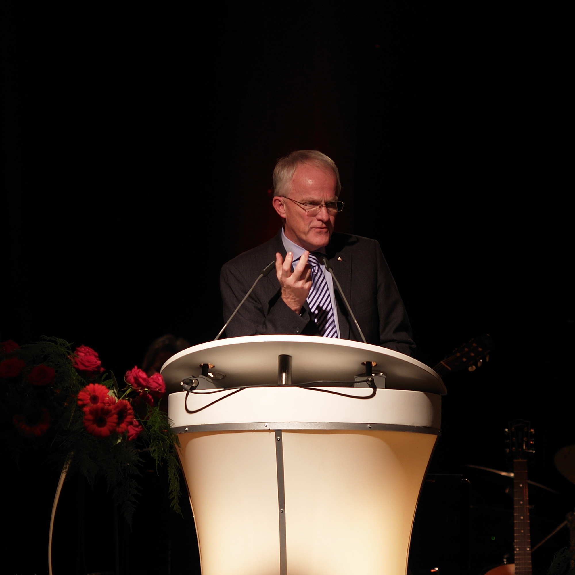 Ministerpräsident Jürgen Rüttgers (Nordrhein-Westfalen) bei der Eröffnung des Ruhr Museums in Essen